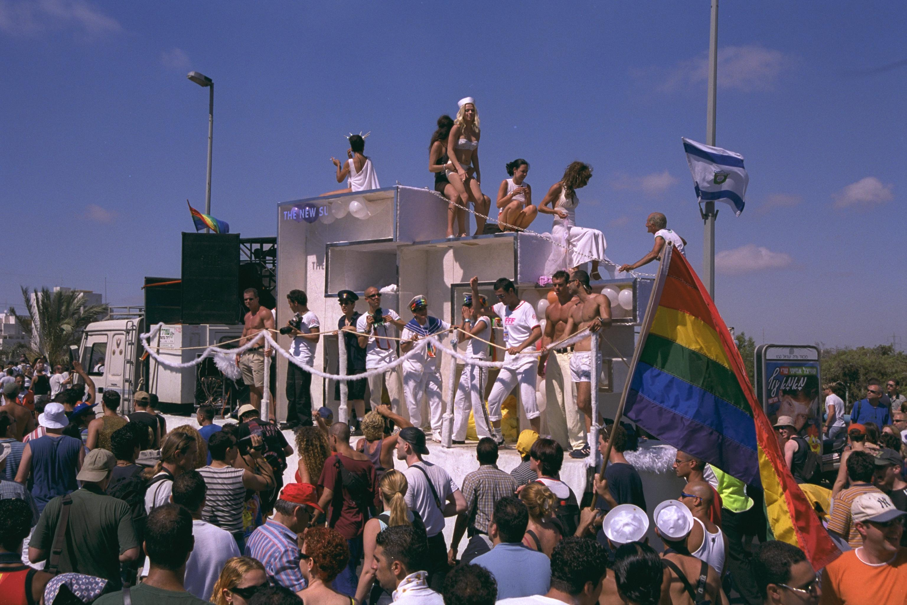 Gay community celebrating in the streets of tel aviv during the pride parade (23/06/2000). חברי הקהילה הגאה של ישראל חוגגים ברחובות תל אביב במהלך מצעד הגאווה